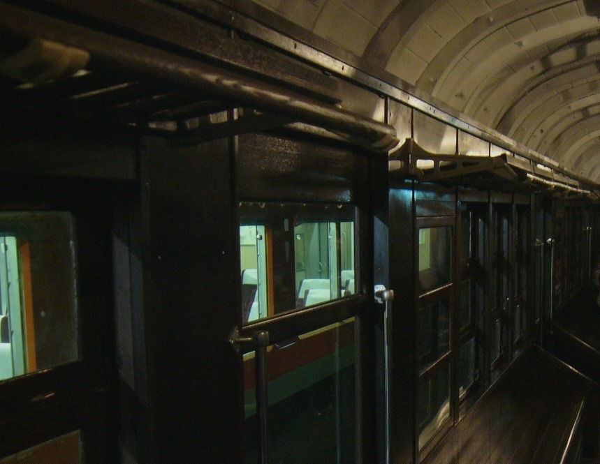 骨組み露出・座席に布地なしの車内 （リニア・鉄道館保存の復元されたモハ63638）